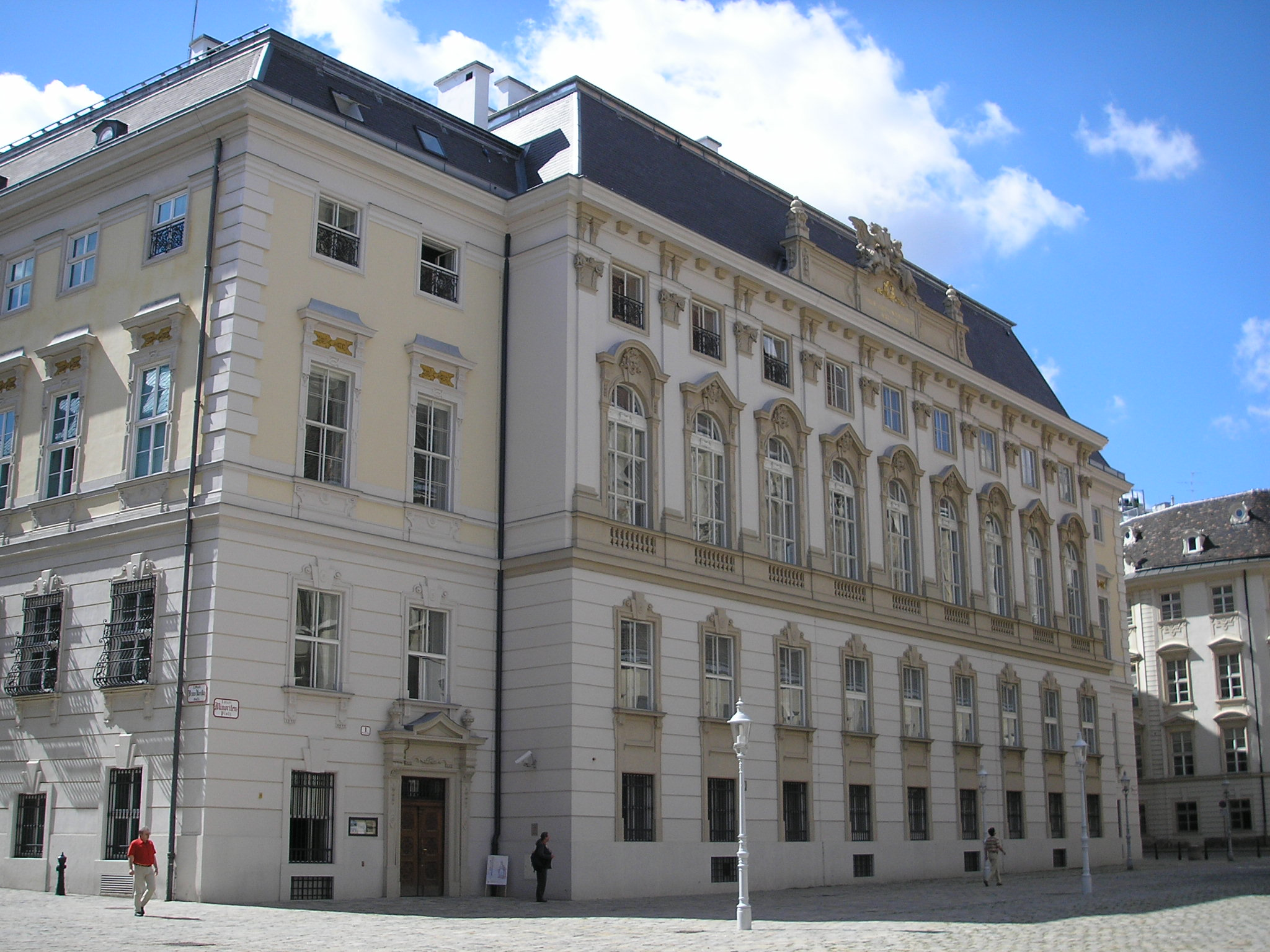 Das österreichische Haus-, Hof- und Staatsarchiv am Minoritenplatz in Wien. The Austrian Family, Court and State Archive in Vienna.